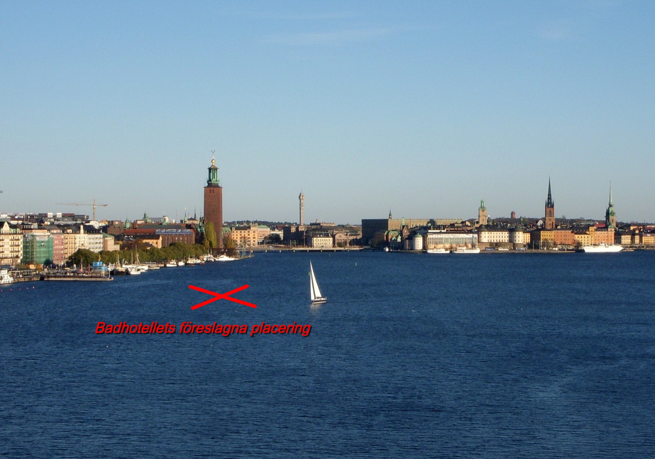 Placeningen för Riddarfjärdens badhotell i Stockholm